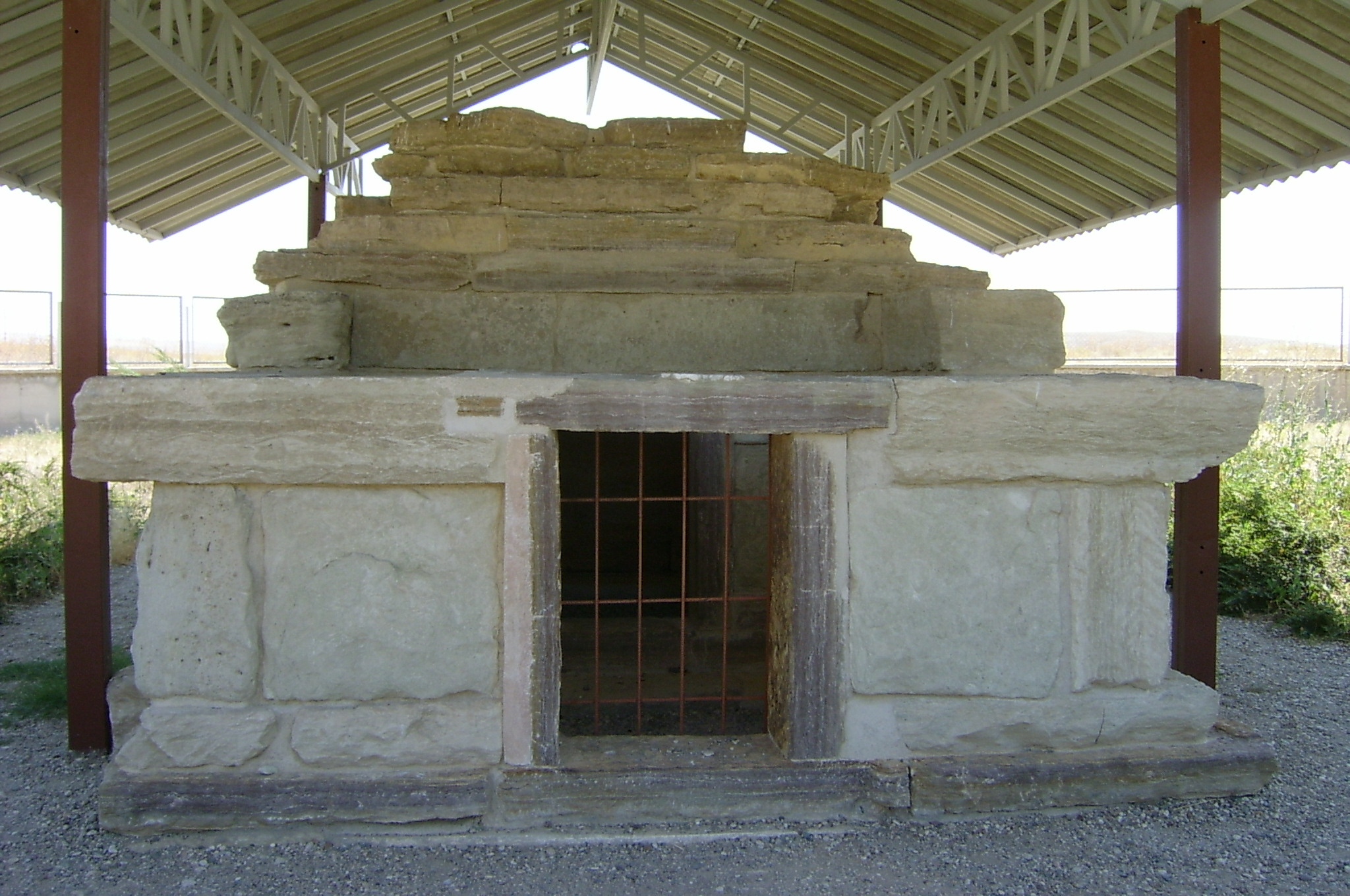 The interior structure of a Phrygian tumulus at Gordion Η εσωτερική δομή ενός φρυγικού τύμβου στο Γόρδιον